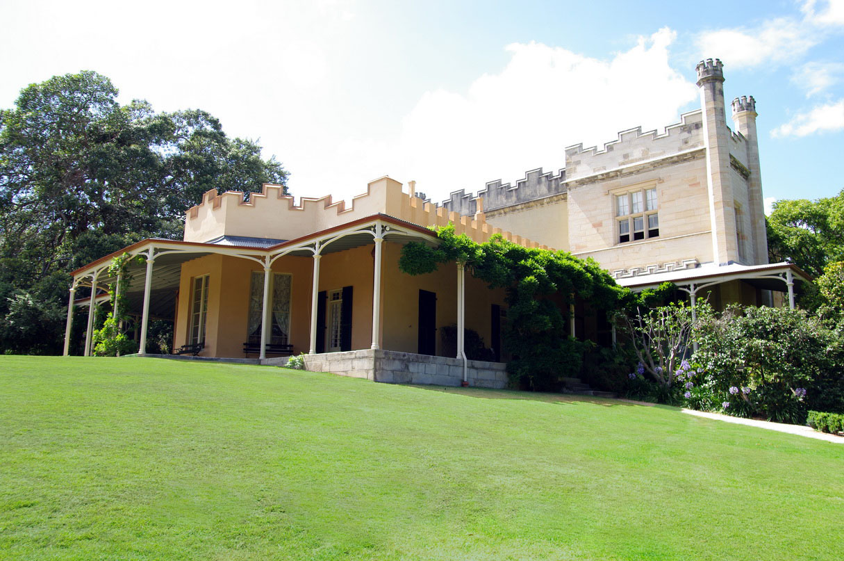 Vaucluse House, Sydney